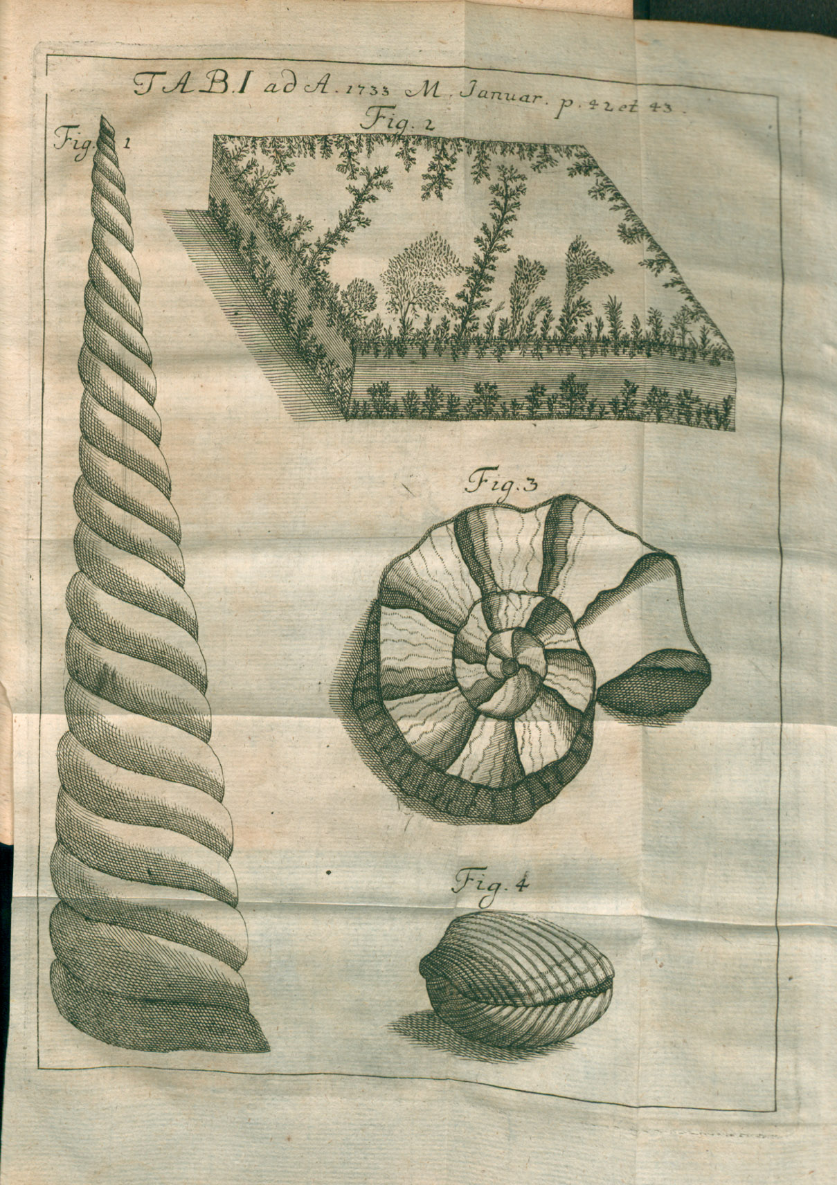 Illustration